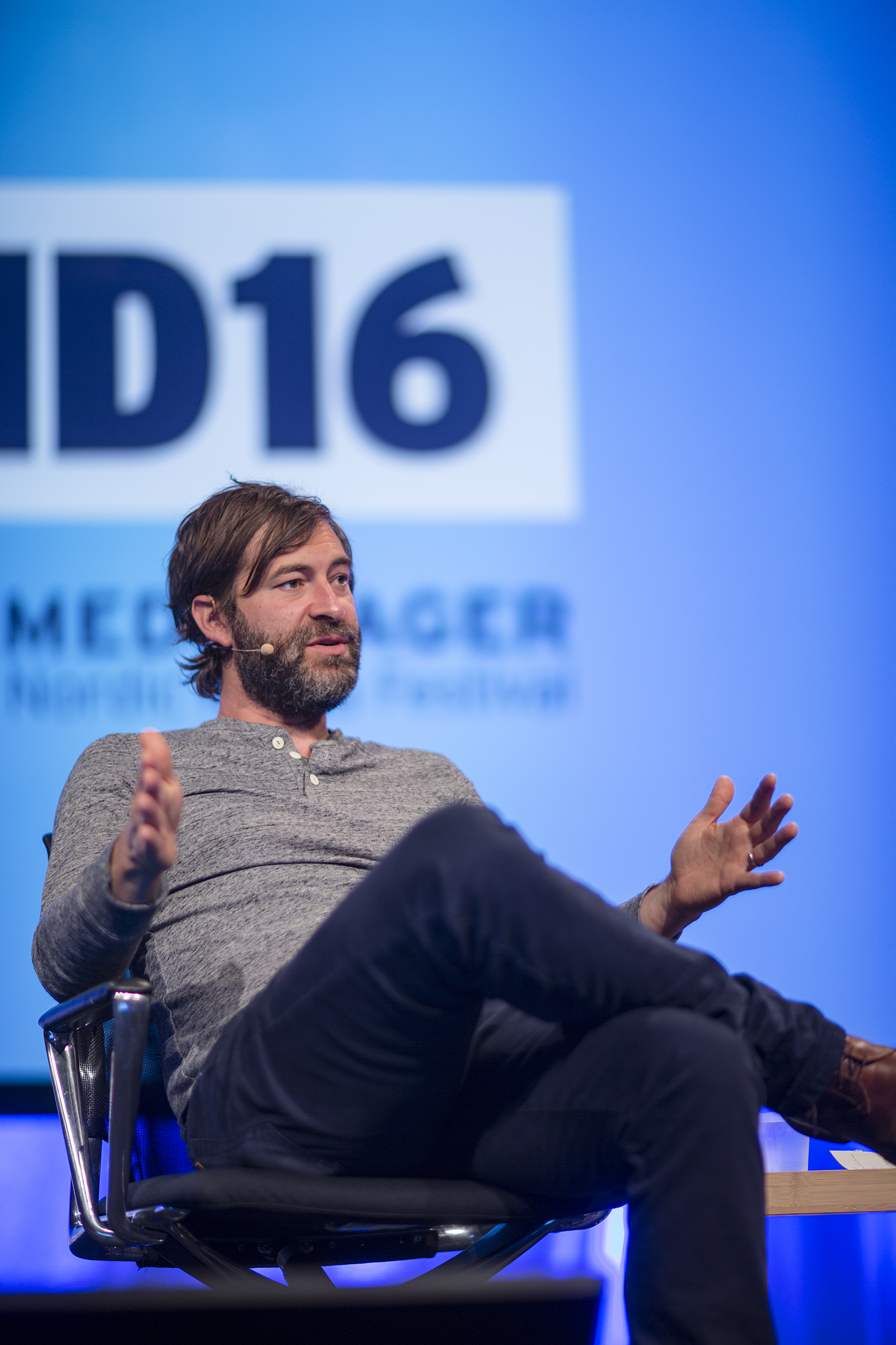 Medvirkende:Mark Duplass produsent, regissør og skuespiller Thomas Seeberg Torjussen: Manusforfatter og regissør